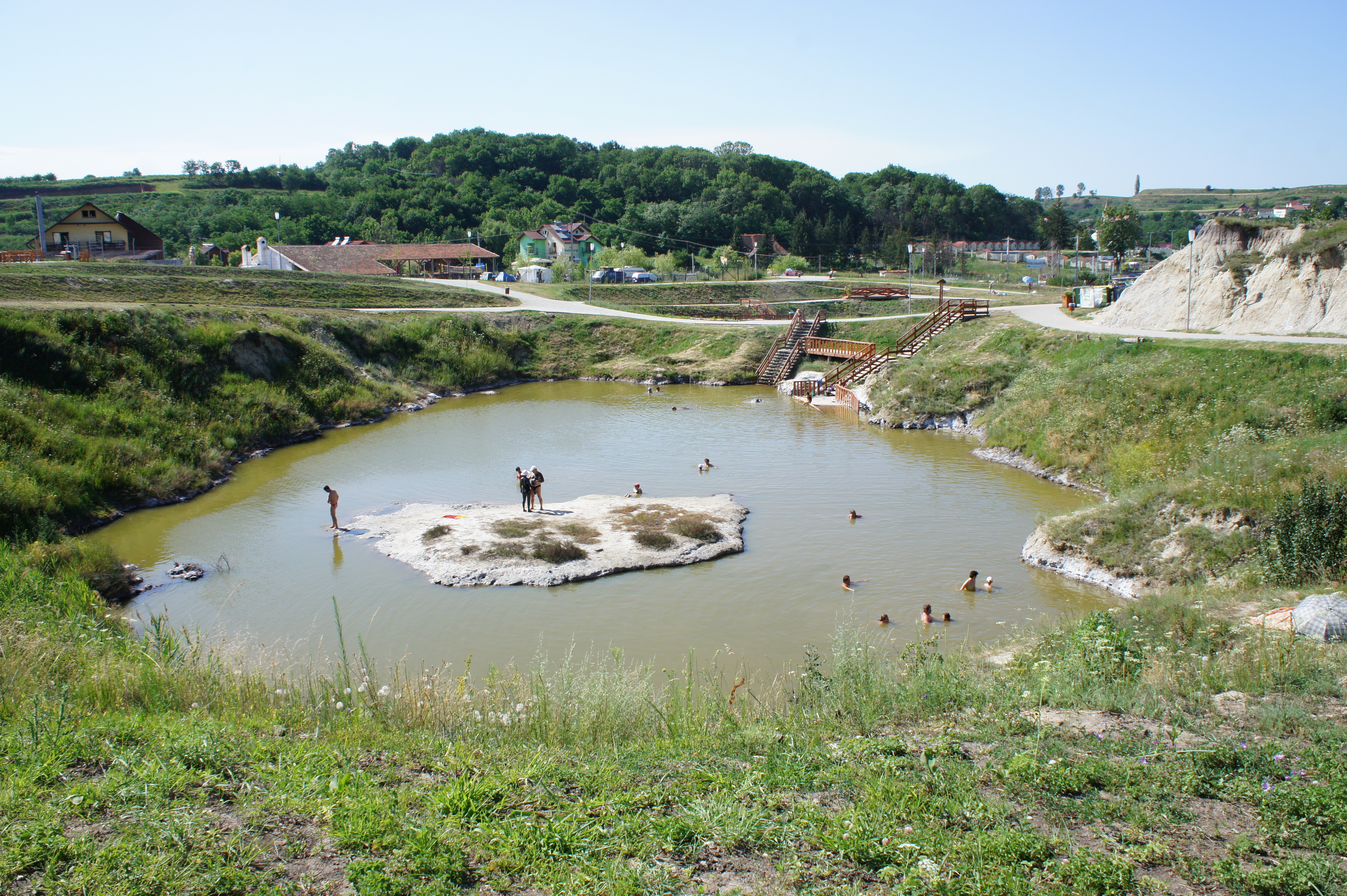 le lac Auster